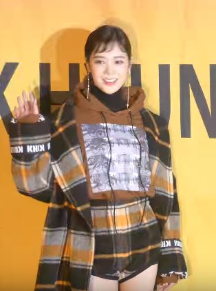 24일 오후 서울시 성동구 성수동 성수연방에서 곽현주 컬렉션(KWAK HYUN JOO COLLECTION) '2019 S/S 오프쇼'가 열렸다.